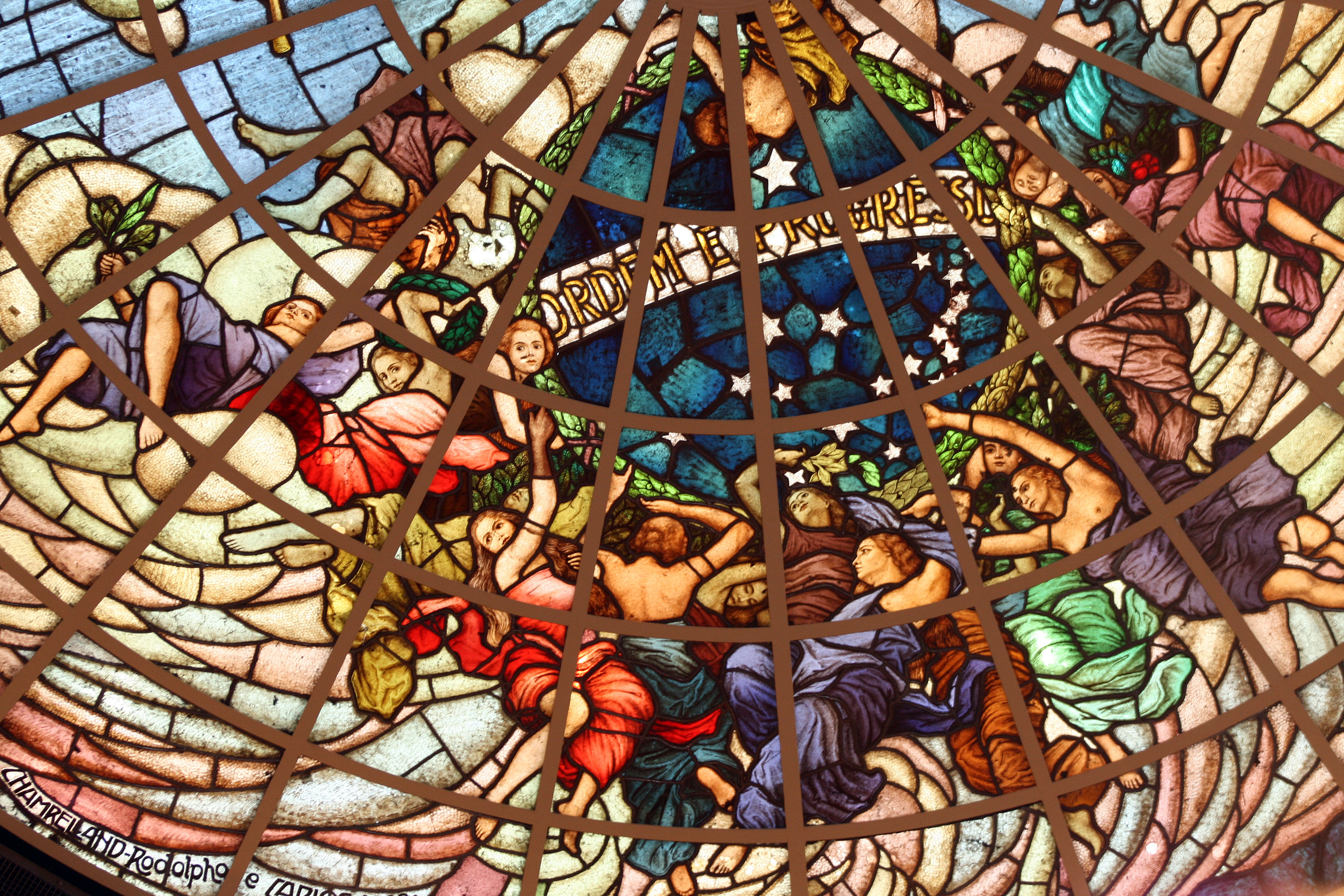 Detalhe do vitral circular executado pela Casa Conrado, de São Paulo, sobre cartão dos Irmãos Chambelland: Carlos (1884-1950) e Rodolfo (1879-1967) da Cúpula do Plenário.